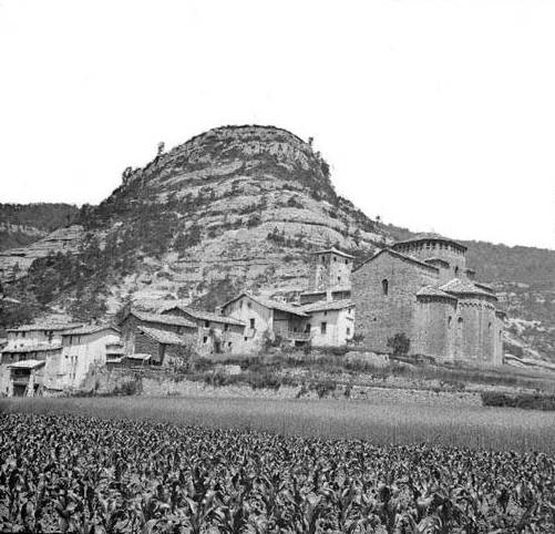 Sant Jaume de Frontanyà amb l'església romànica. Frederic Bordas i Altarriba (1900)